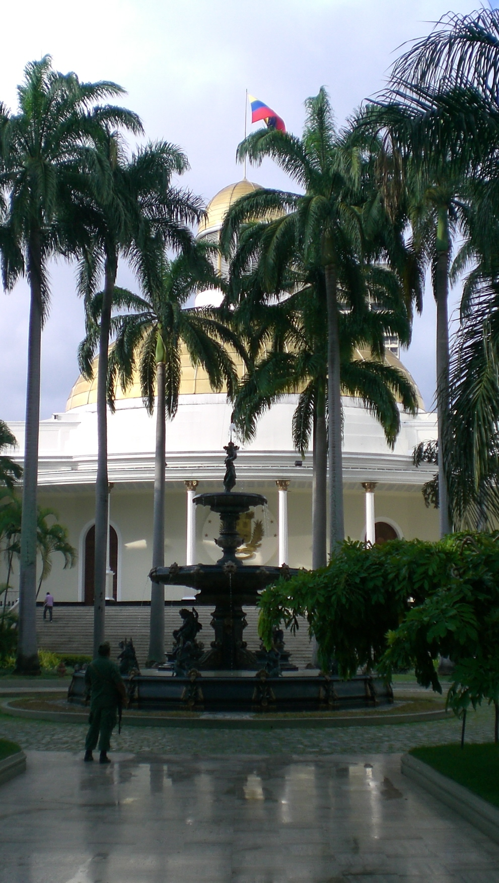 Palacio Federal Legislativo, Caracas.